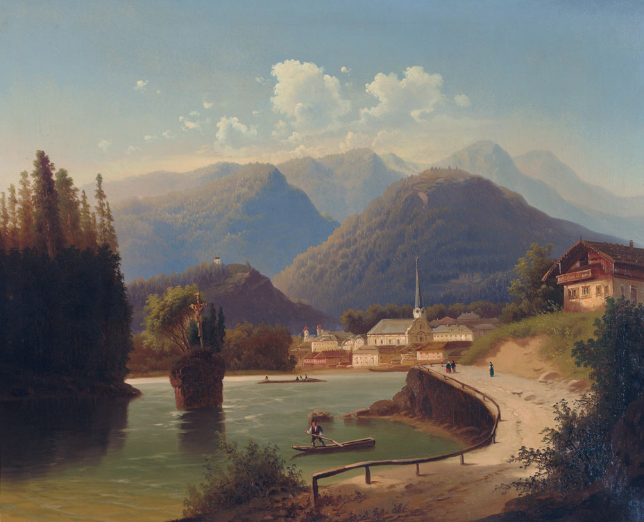 Blick auf Bad Ischl am Wolfgangsee an einem Sommertag